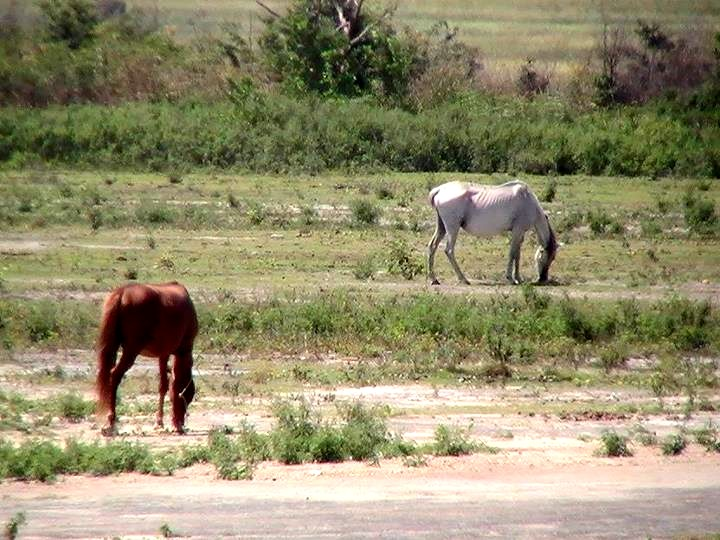 Caballos fotografiados en Casanay y sus imnediaciones, estado Sucre - Venezuela (2010)